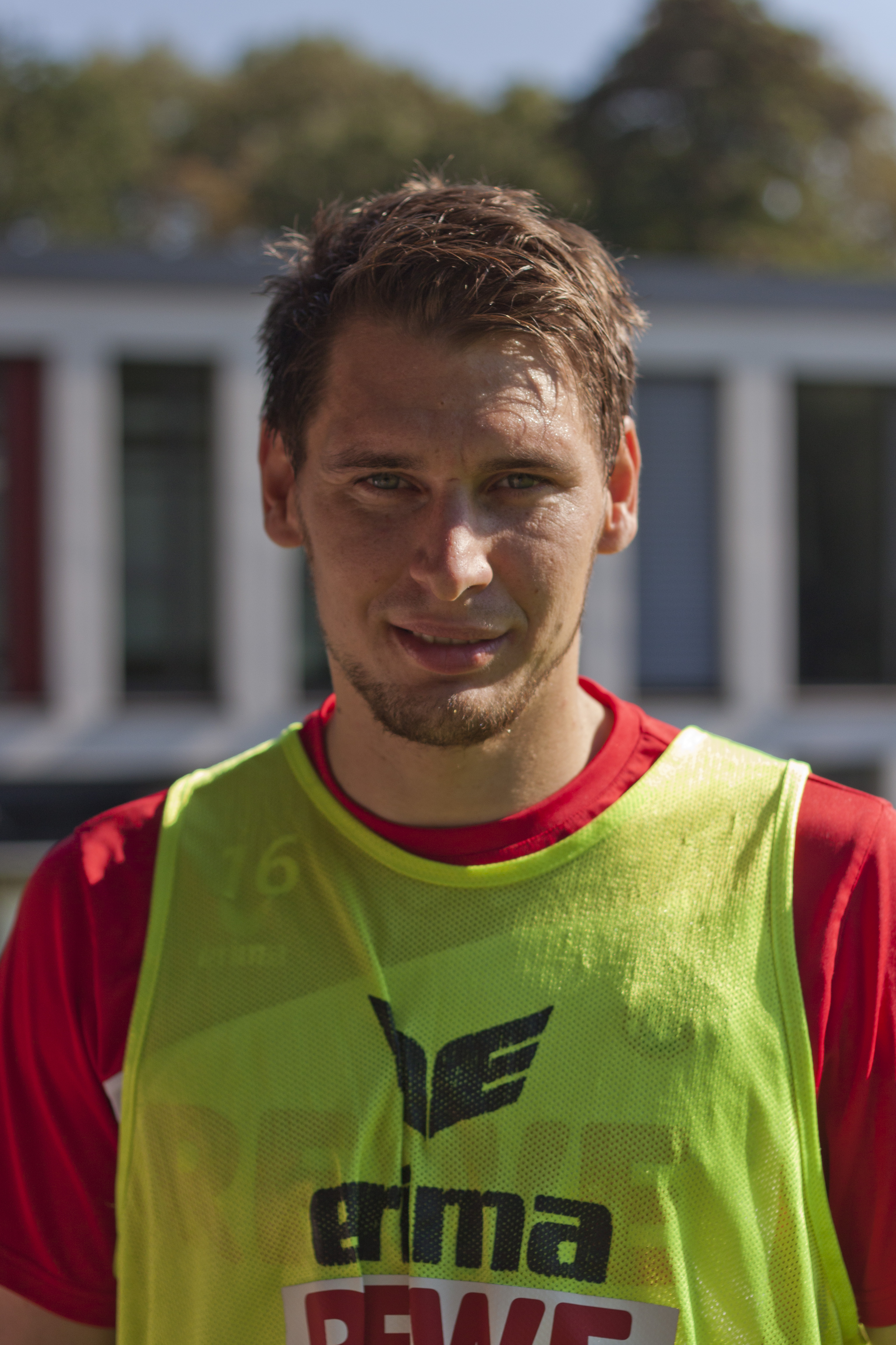 Patrick Helmes beim öffentlichen Training des 1. FC Köln